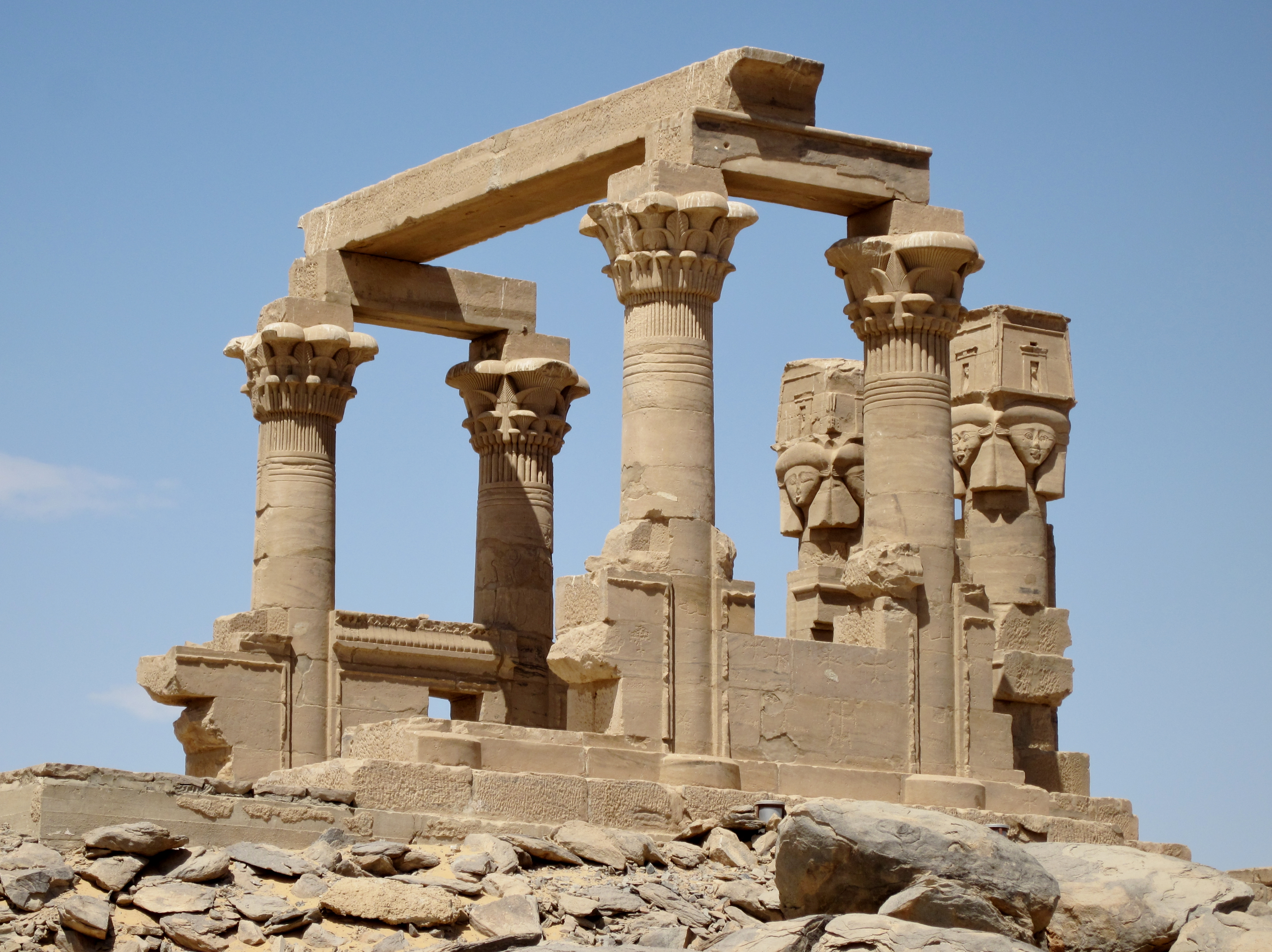 Der Kiosk von Kertassi nahe dem Assuan-Hochdamm, Ägypten